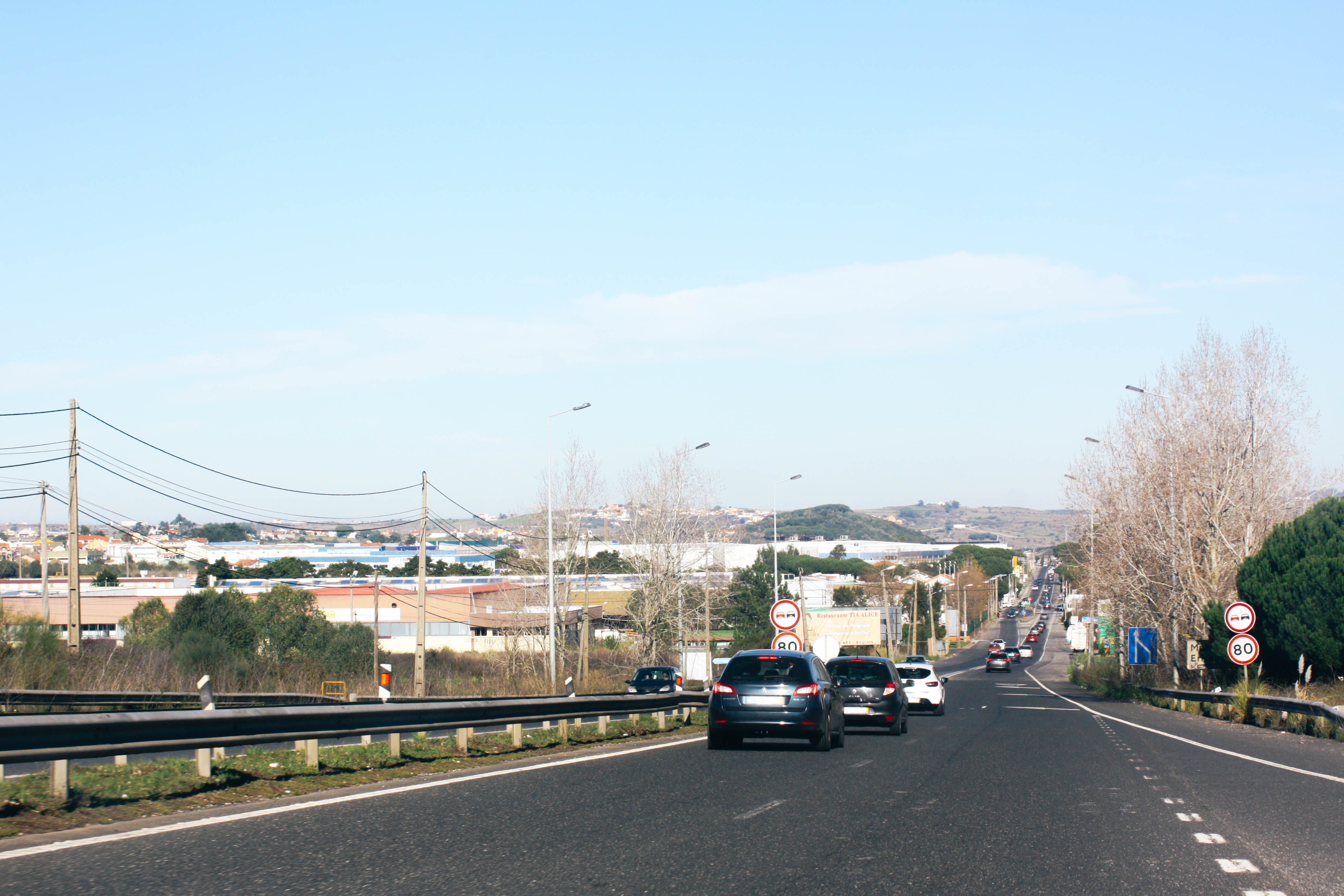 Entrada na zona industrial de Ral após o nó da A16.